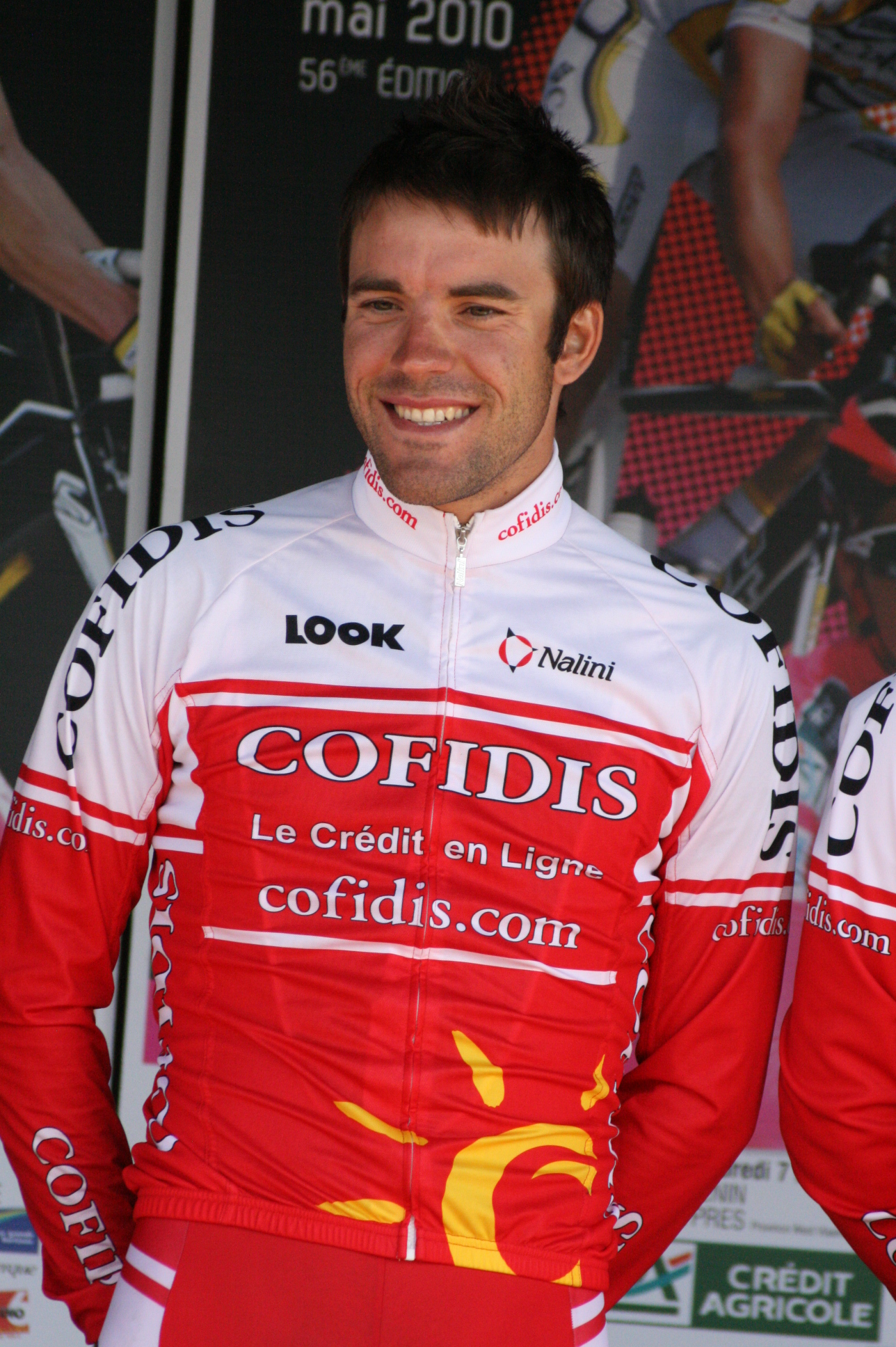 Amaël Moinard, lors de la présentation des équipes des 4 jours de Dunkerque 2010